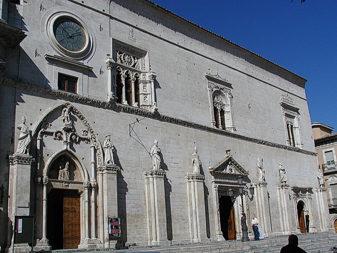 Museo Civico